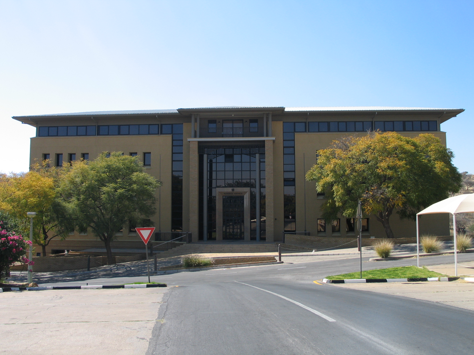 National Council Building, Windhoek Namibia